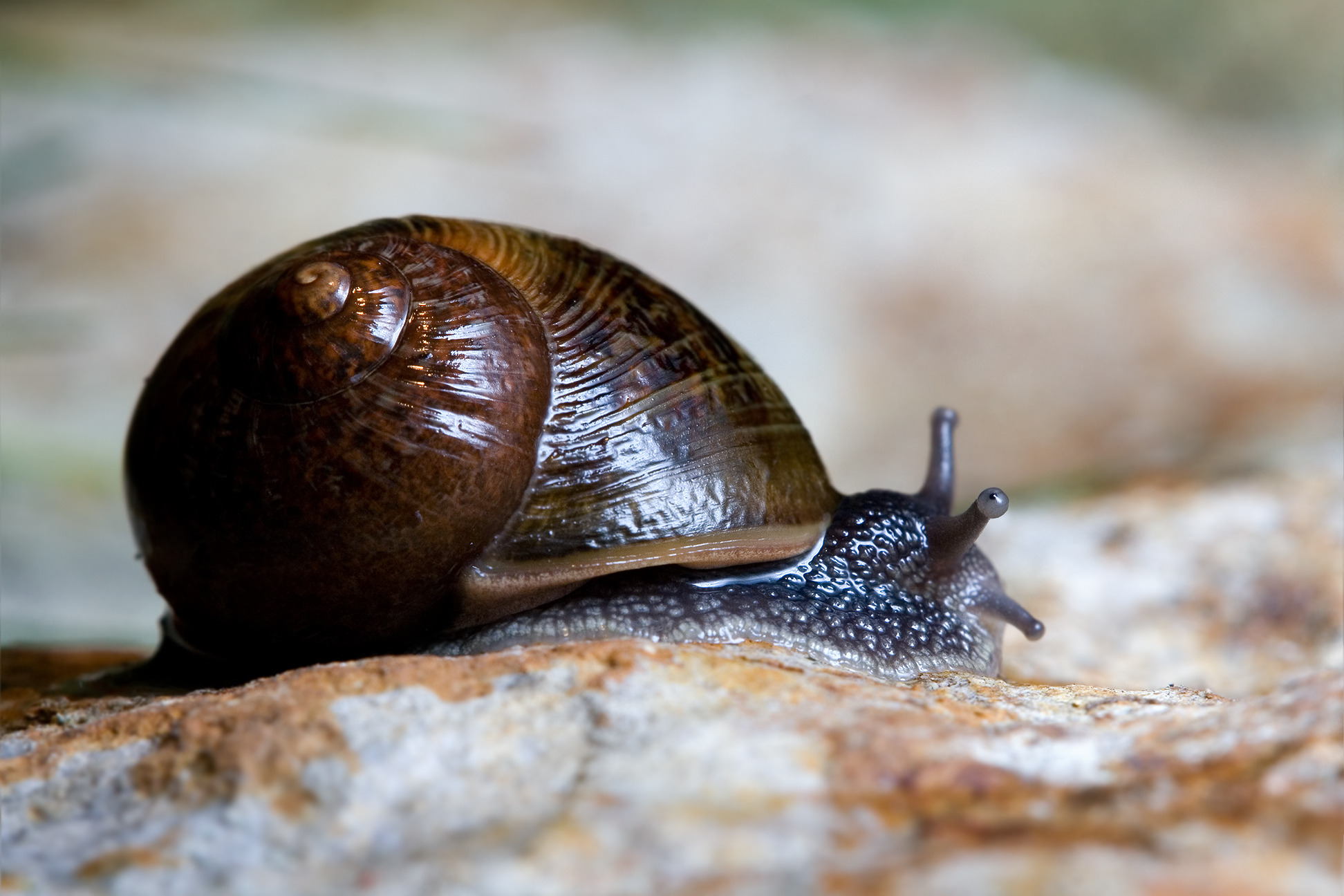 Helix (?)